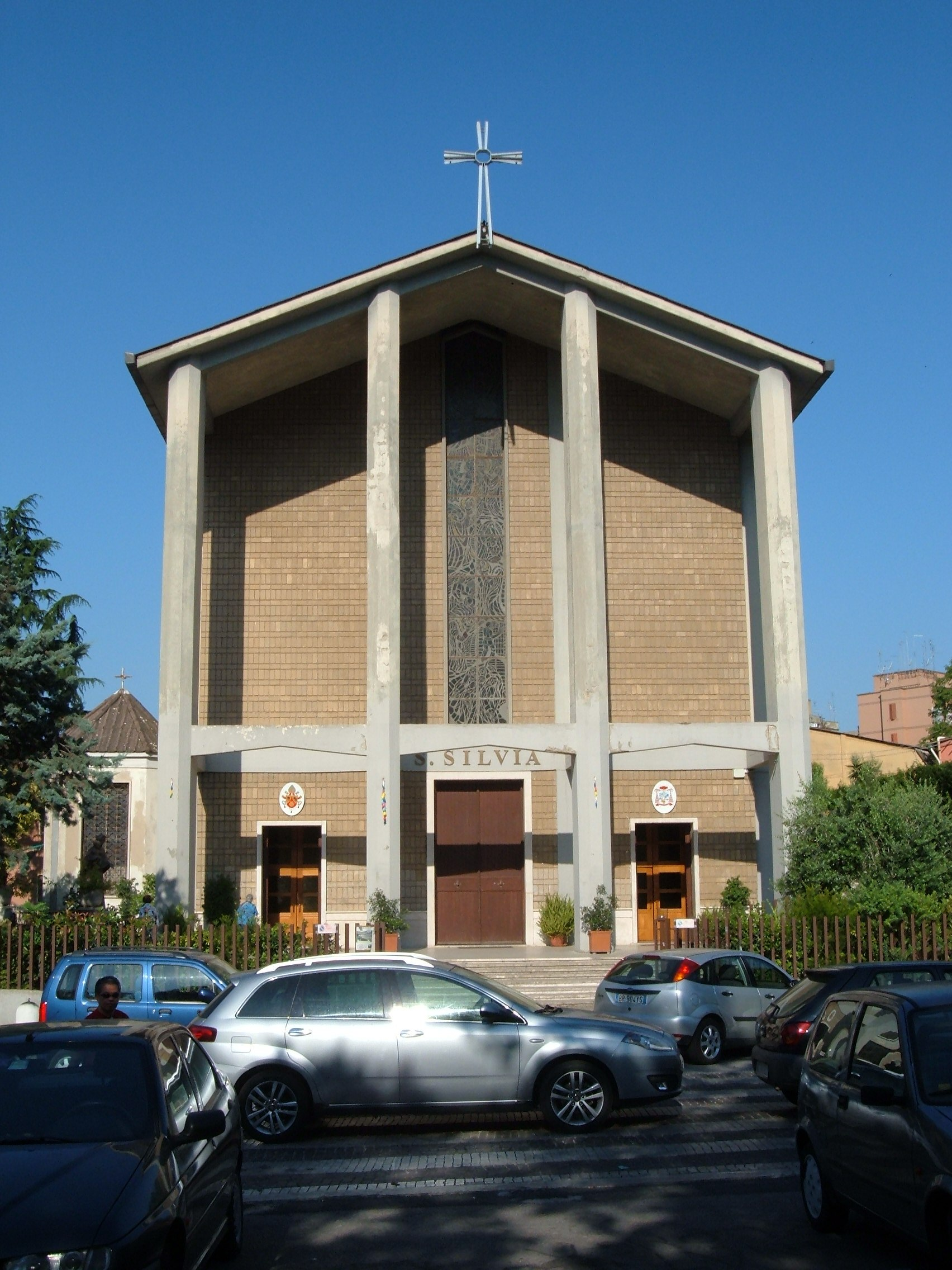 Chiesa di Santa Silvia, a Roma, nel quartiere Portuense.